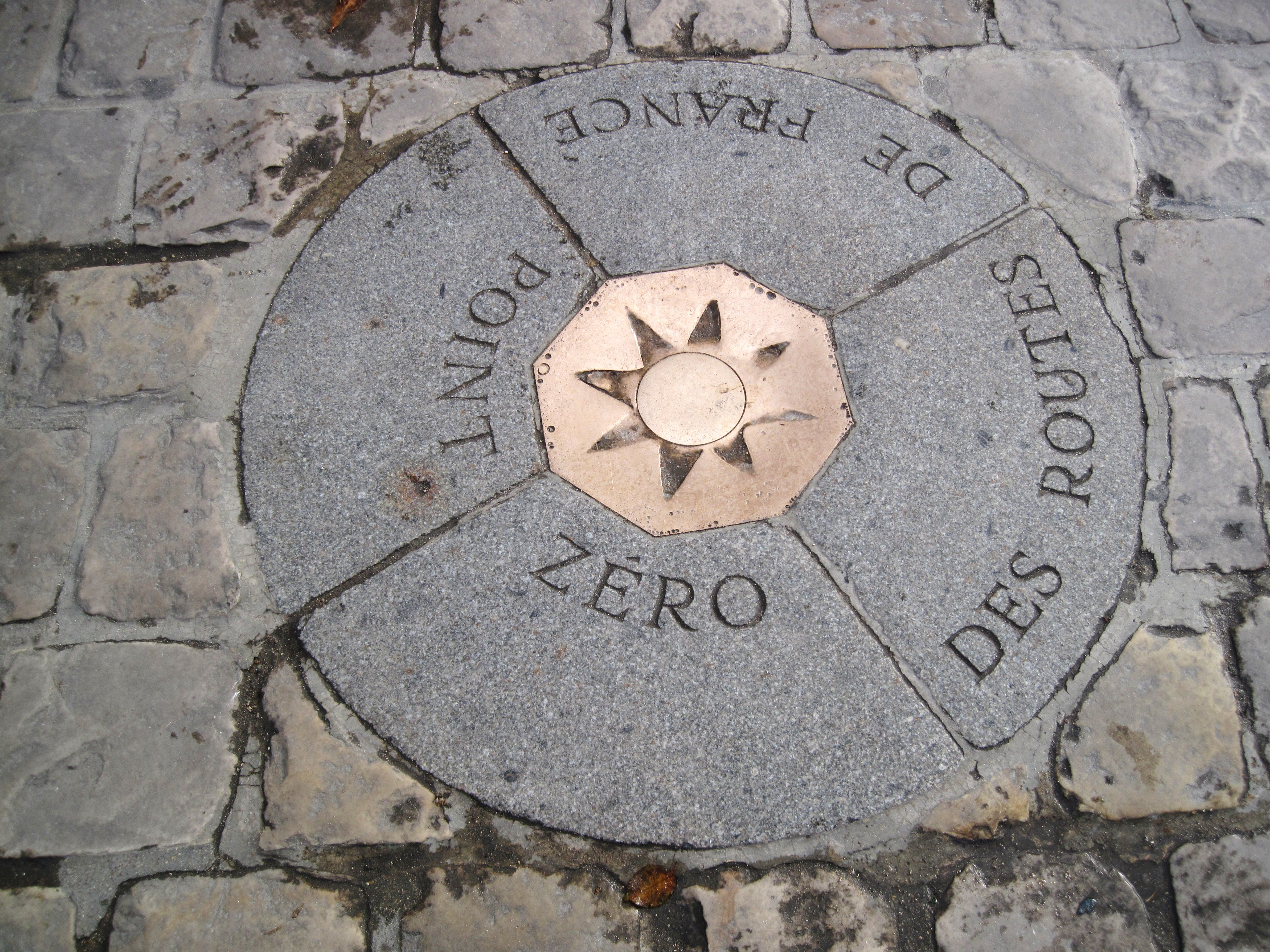 Le Point Zéro (plus précisément le Point Kilomètre Zéro) des Routes de France est matérialisé par une dalle en quatre quartiers au centre de laquelle est placé un médaillon octogonal représentant une rose des vents. C' est à partir de ce point que sont calculées, en kilomètres, les distances routières entre Paris et les autres villes de France. Ce Point Zéro est situé sur le parvis de Notre-Dame de Paris. Paris, France